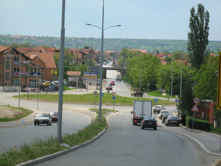 Улаз у насеље Девети мај